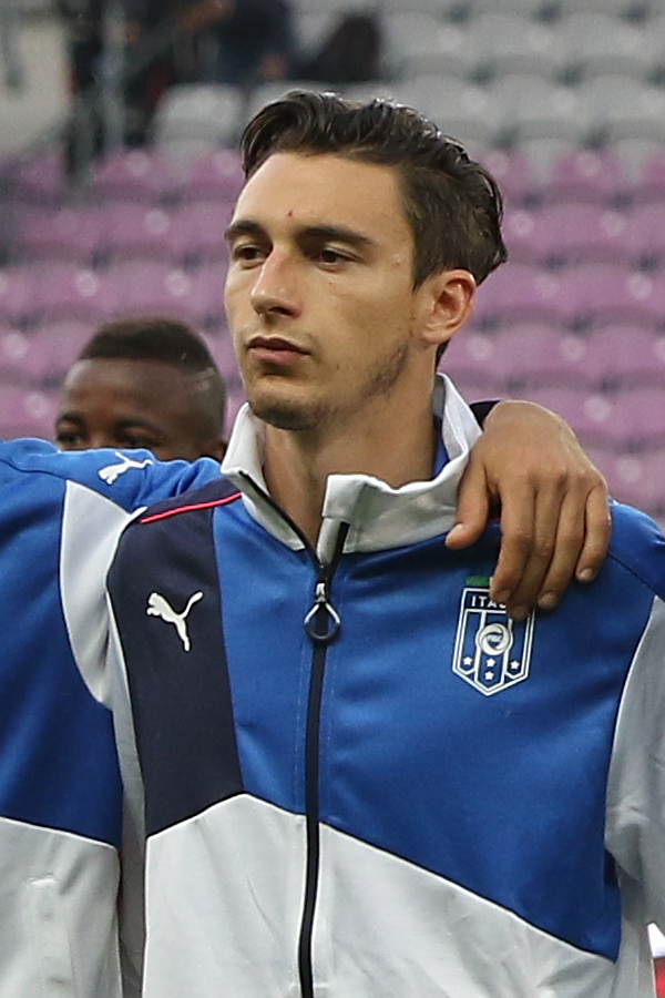 20150616 - Portugal - Italie - Genève - Matteo Darmian